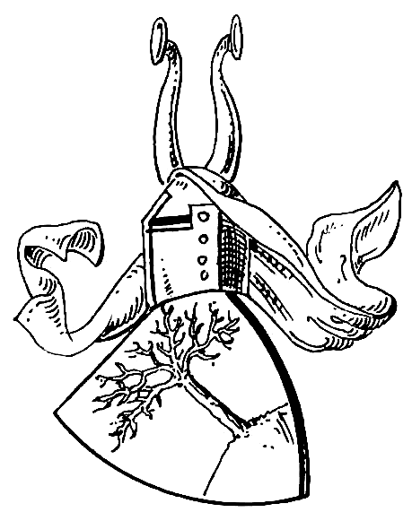 Wappen der von Hagenau (Hagenowe)